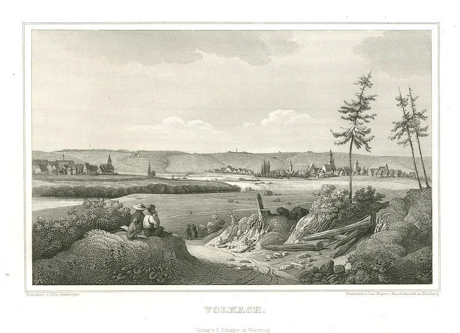 Volkach. Stahlstich nach Vorzeichnung von Fritz Bamberger, 1847, aus: Ludwig Braunfels; Die Mainufer und ihre nächsten Umgebungen. Verlag Carl Etlinger, Würzburg 1847. Gedruckt in der Kunstanstalt von Carl Mayer, Nürnberg.